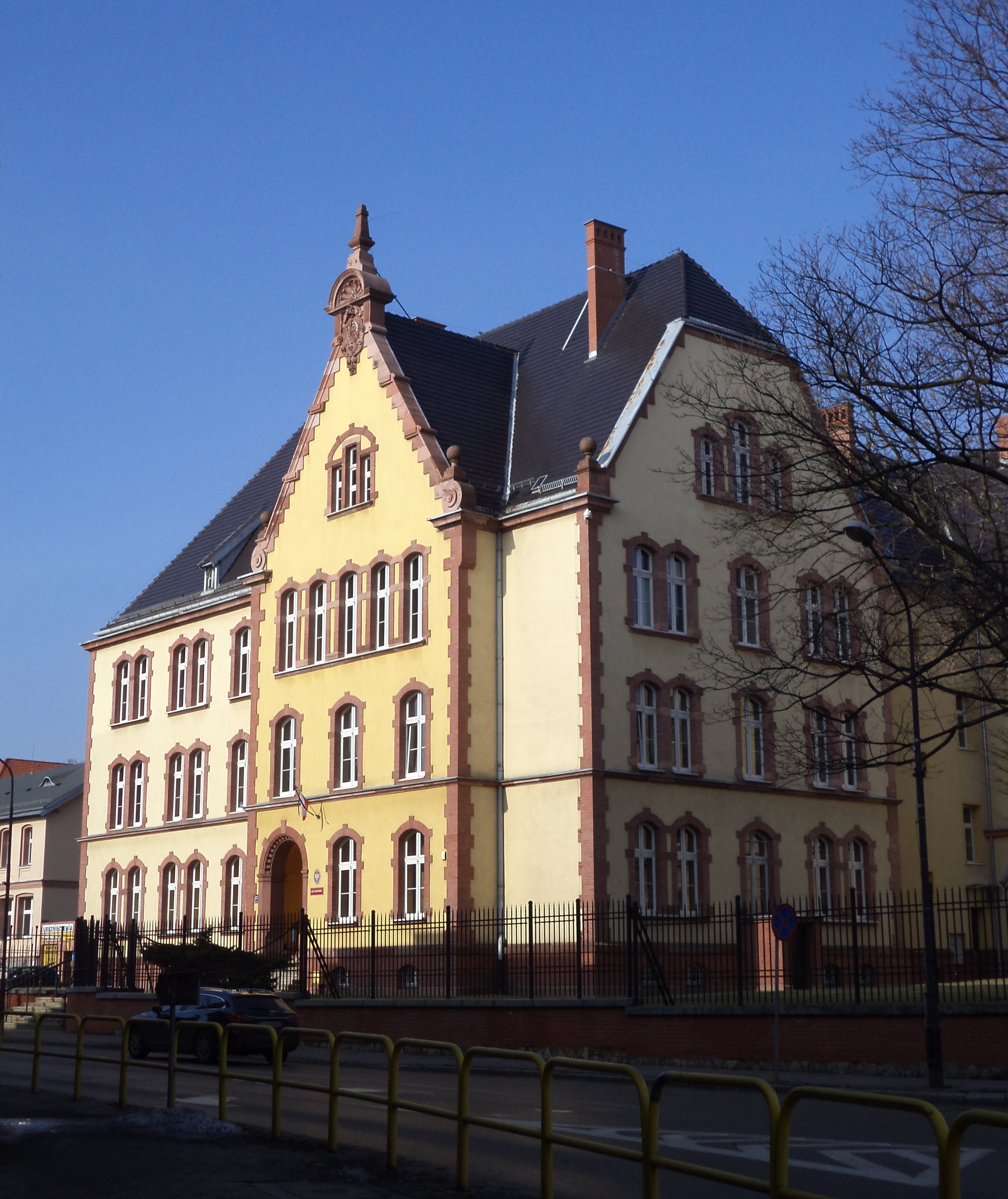 Gmach Sądu Rejonowego przy ulicy Opolskiej 17 w Tarnowskich Górach